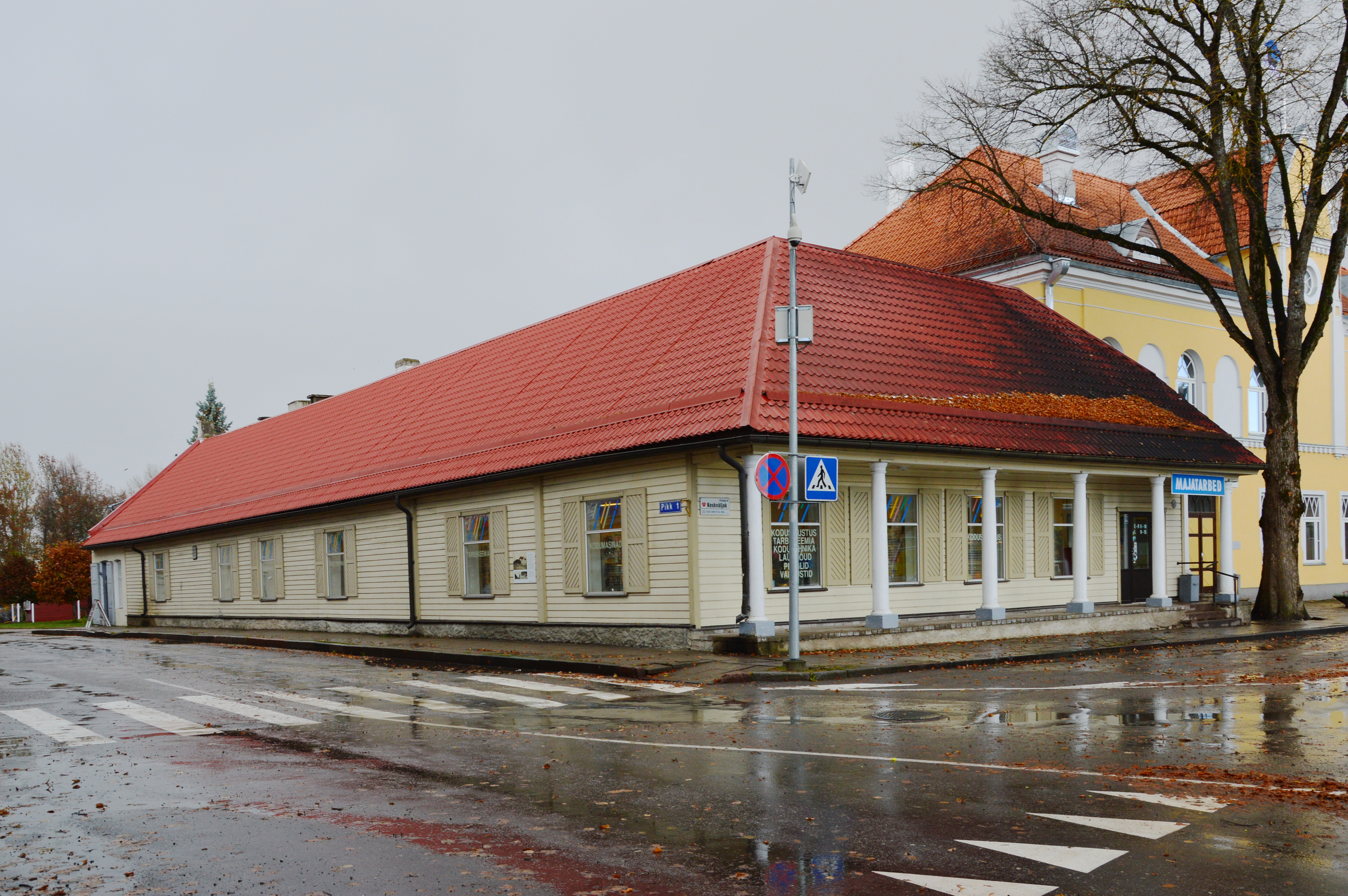 Paide kaubahoovi ärihoone